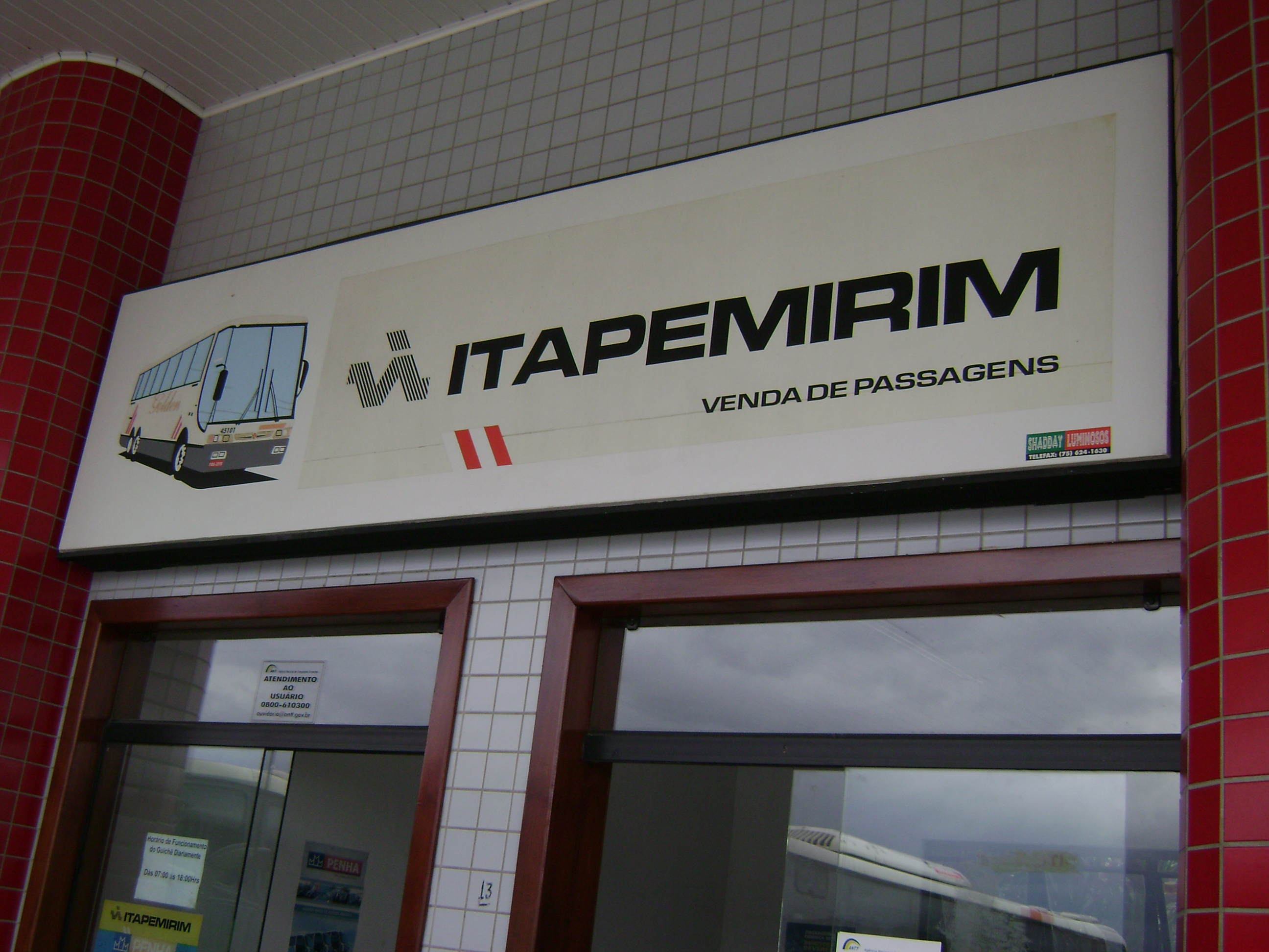 Filial da Itapemirim no Apoio Rodoviário de Jequié, no estado da Bahia, Brasil.